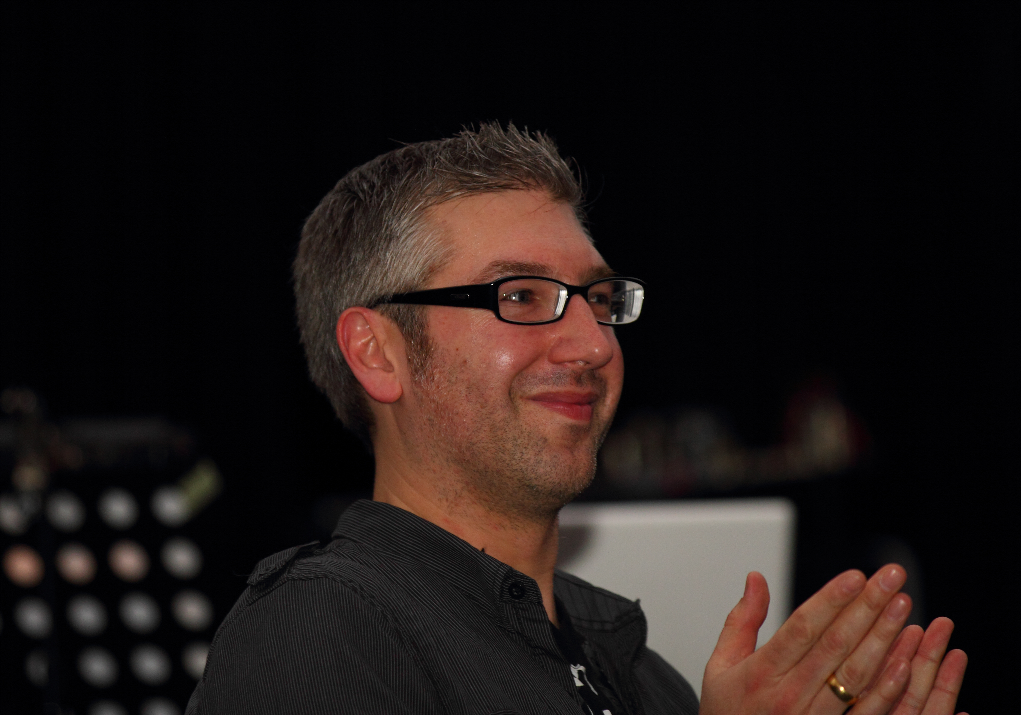 Verleihung des Schallwelle-Musikpreises am 10. März 2012. Kuppel des Planetariums Bochum. Bekanntgabe des Gewinners in der Kategorie «Bester Künstler national», Steve Baltes ist Laudator.